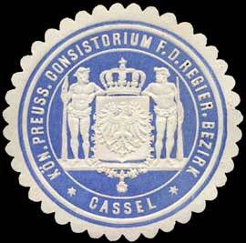 Sealing stamp Title: Königlich Preussisches Consistorium für den Regierungsbezirk - Cassel Description: blau, weiß, geprägt Place: Kassel size: 4 cm